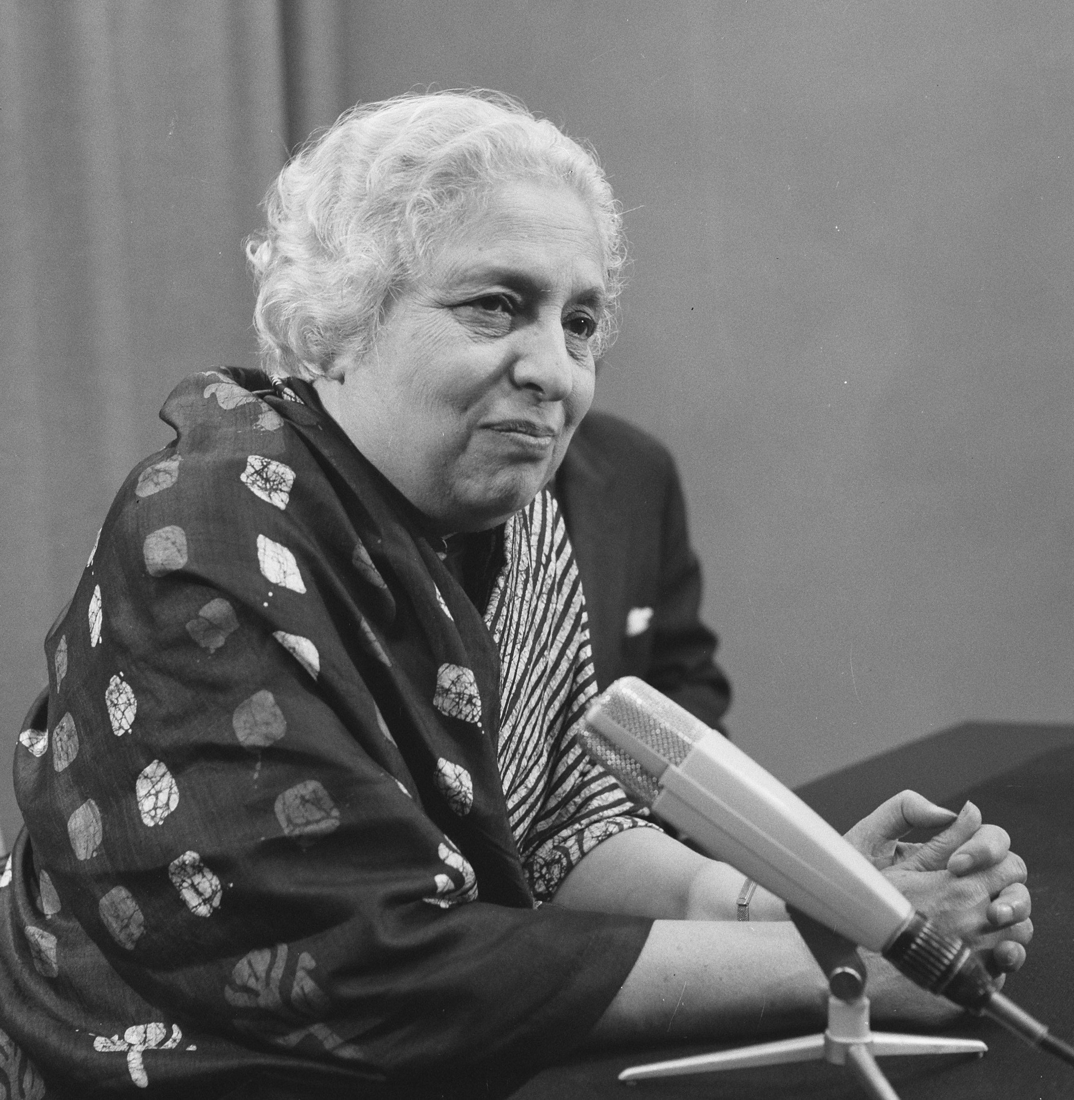 Mevrouw Vijaya Lakshmi Pandit, politica en diplomate en zuster van Pandit Nehru, tijdens een vierdaags bezoek aan Nederland